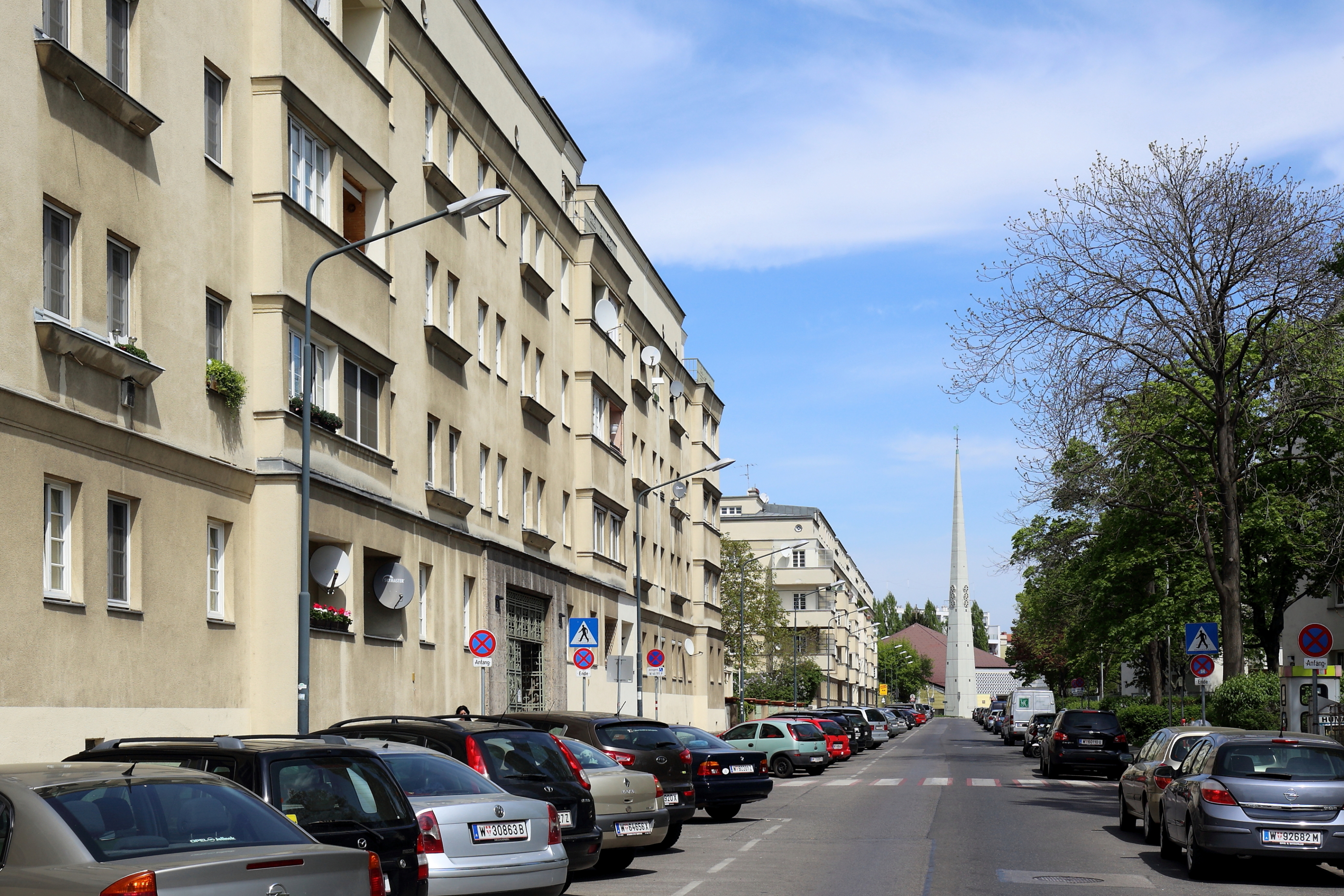 Die Dunantgasse in Jedlesee, ein Ortsteil im 21. Wiener Gemeindebezirk Floridsdorf. Links im Bild der von 1926 bis 1933 errichtete Karl-Seitz-Hof und in der Achse der Dunantgasse im Hintergrund der Kirchturm der Pfarrkiche Blut Christi. Diese wurde von 1962 bis 1964 nach Plänen des Architekten Alfons Leitl errichtet.